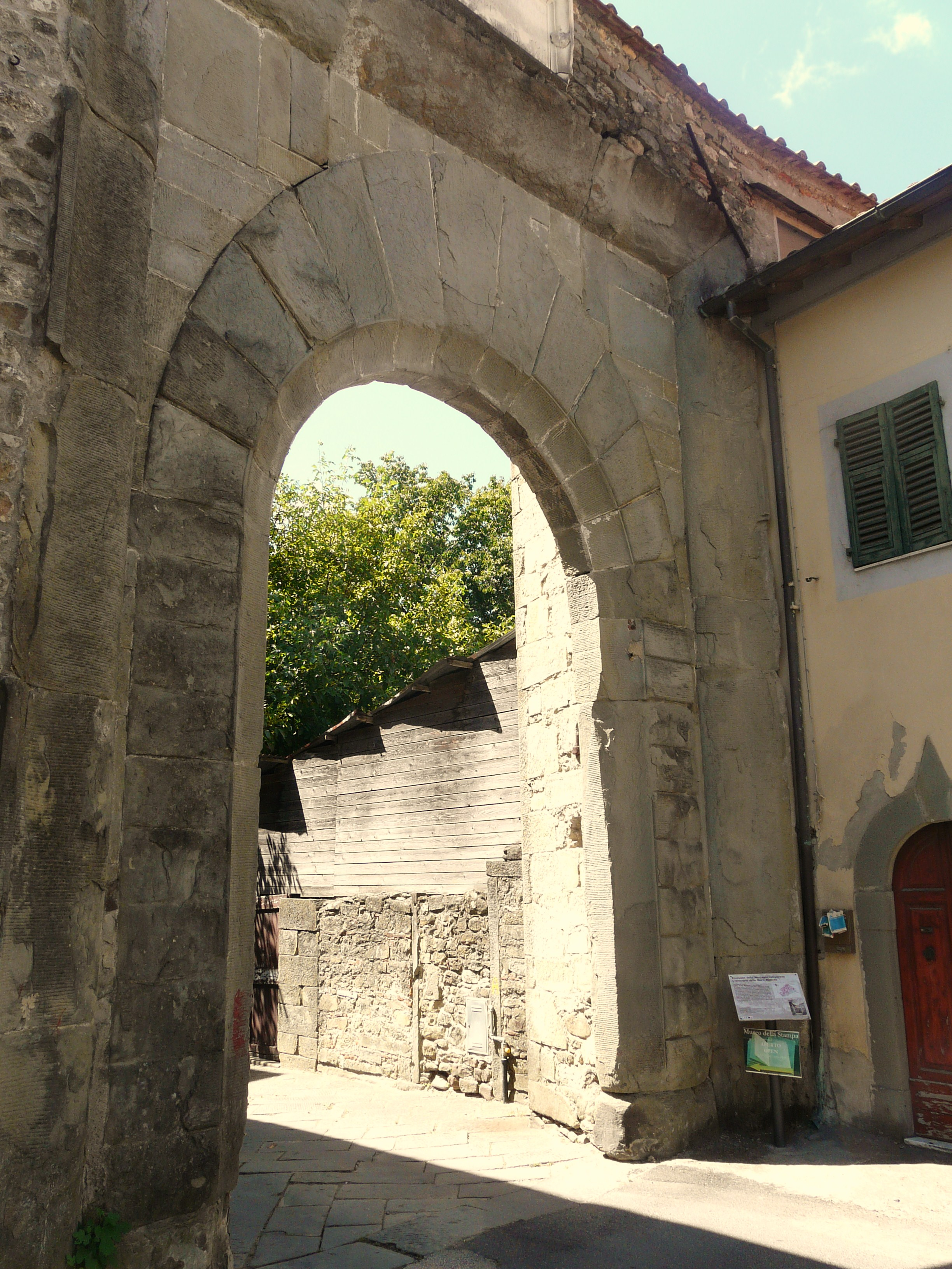 Porta detta "Modenese" o "Verrucolana", Fivizzano, Toscana, Italia